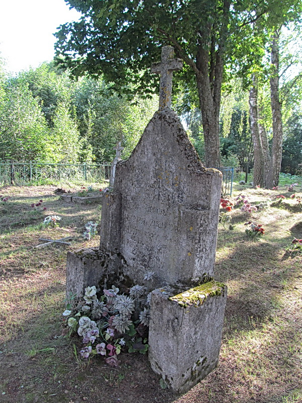 Латочкі. Могілкі